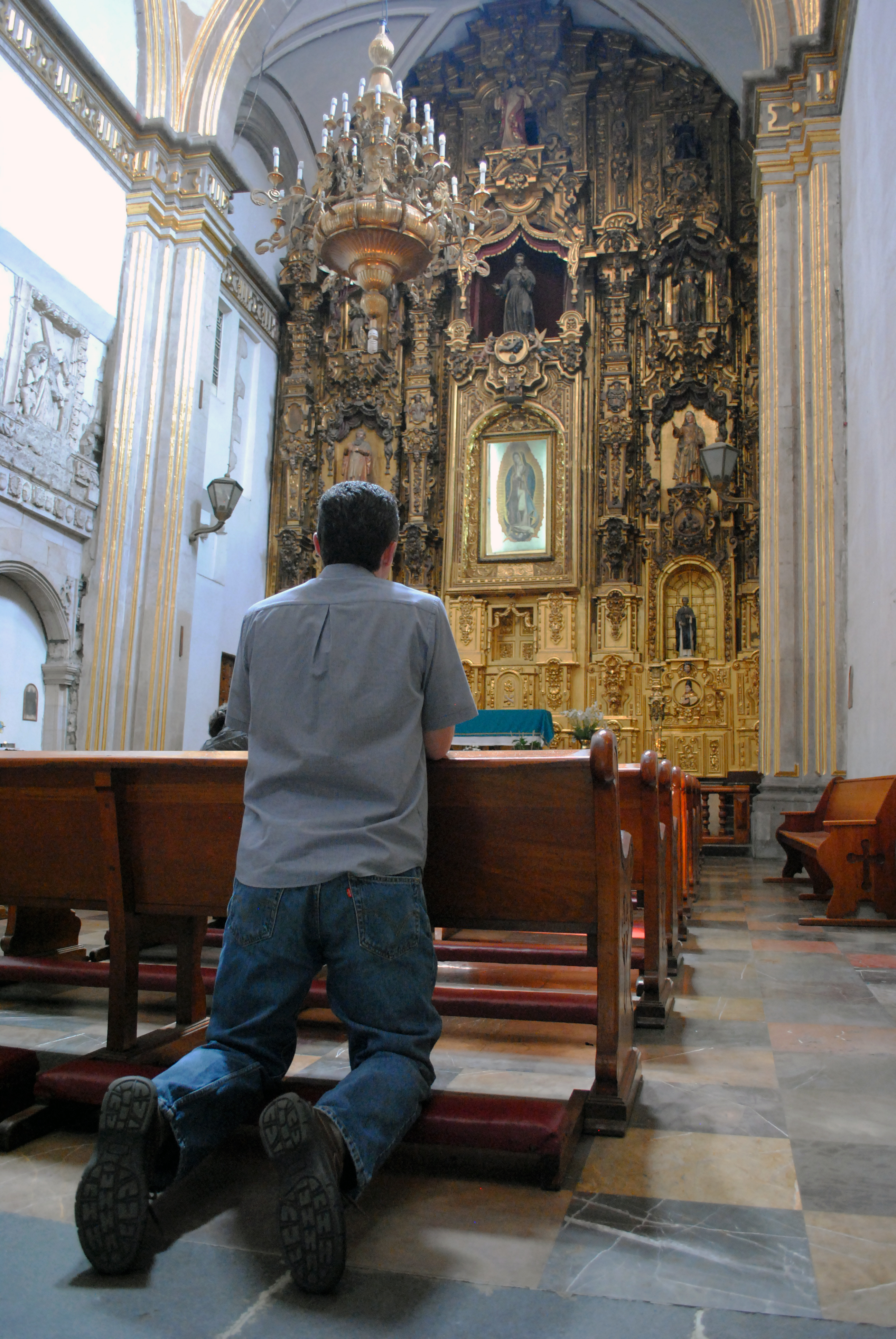 Interior del Convento de San Francisco, Centro Histórico de la Ciudad de México.